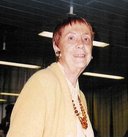 Die argentinische Schriftstellerin Angélica Gorodischer 1998 auf einem Kongress in Rosario, Argentinien